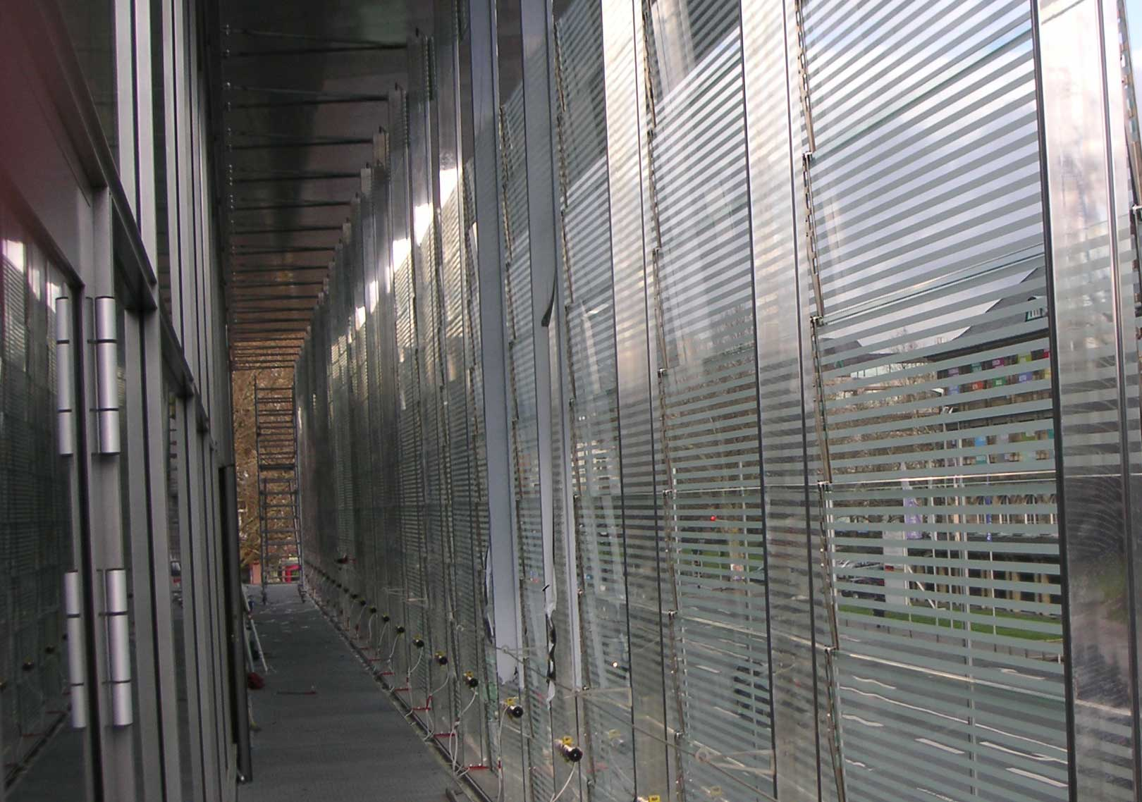 Zweite-Haut-Fassade